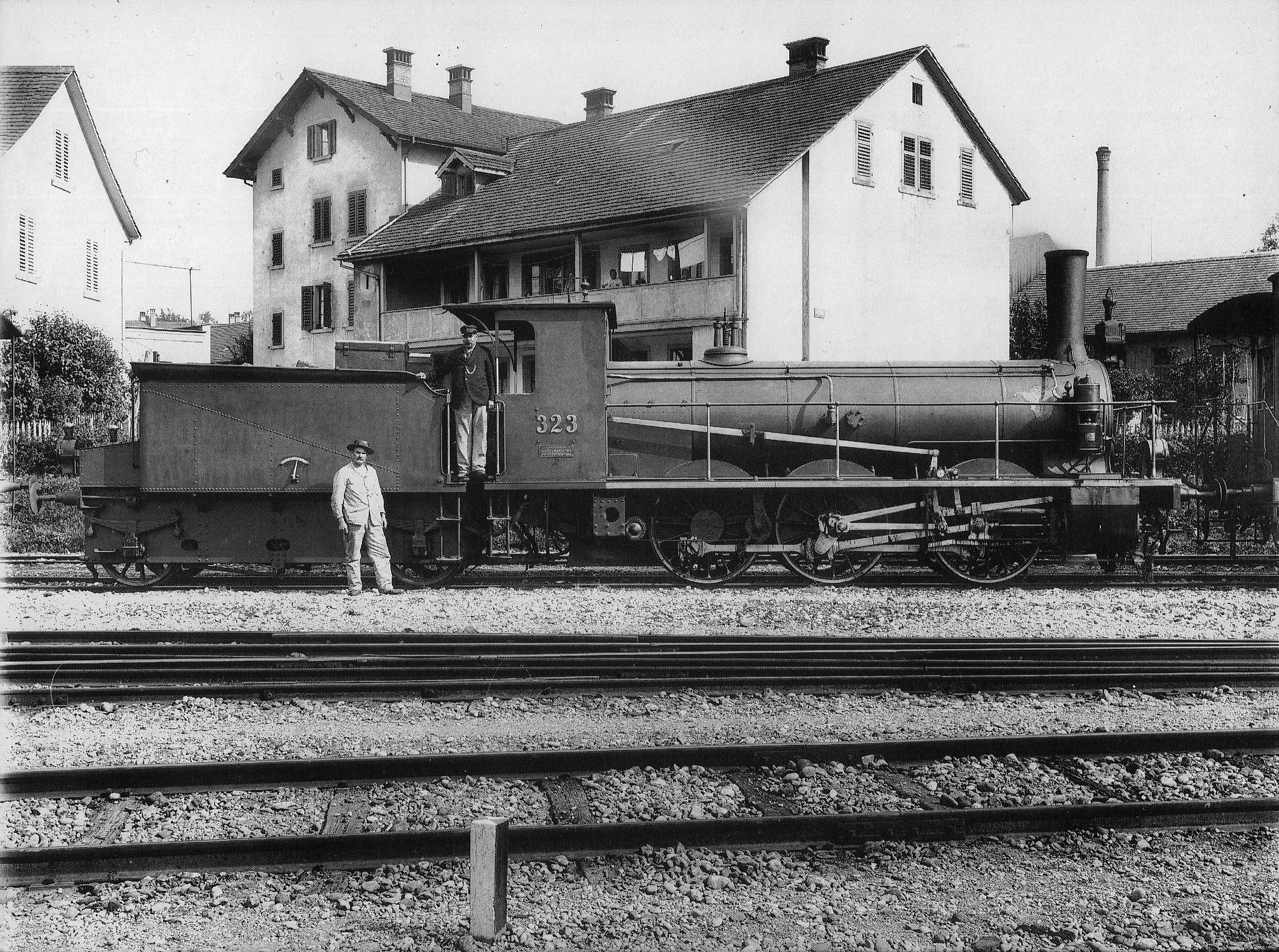 Güterzug-Locomotive Nr. 323 (bis 1895 Nr. 151) des Typs B3T der Schweizeriſchen Nordoſtbahn, gebaut 1889 inn der Schweizeriſchen Locomotiv- und Machinen-Fabrique zů Winterthur (Fabr.-Nr. 571), 1902 von den Schweizeriſchen Bundesbahnen übernommen als C 3/3 Nr. 2421, 1916 an an die k. u. k. Heeresverwaltung verkauft, 1918 an die Ungariſche Staatsbahn übergegangen, Abbruchjahr unbekannt; aufgnommen zwiſchen 1895 und 1902 im Bahnhofe von Töß.